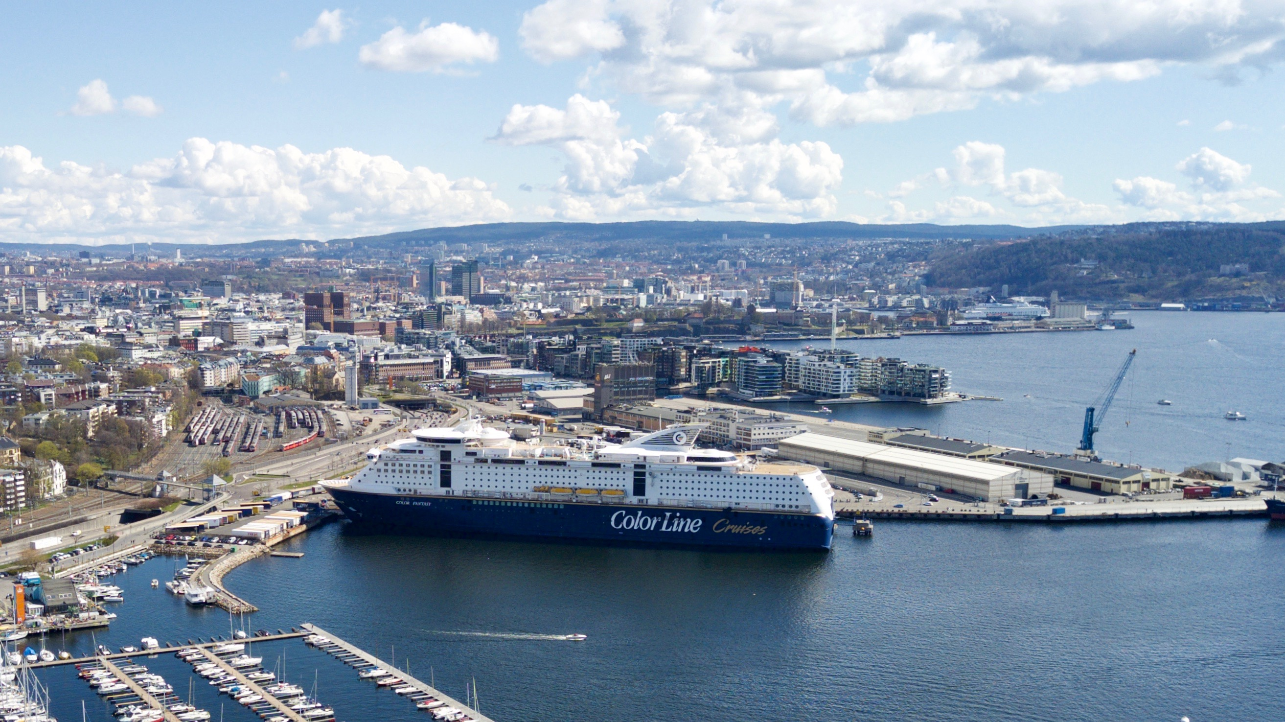 Filipstad i Oslo. «Color Fantasy»